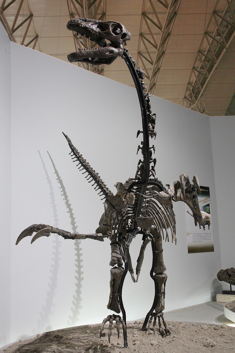 Erliansaurus - 02